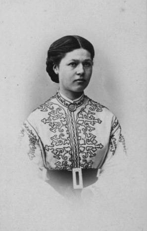 Евгения Яковлевна Дашкова (1842—1906), в замужестве баронесса Бойэ.